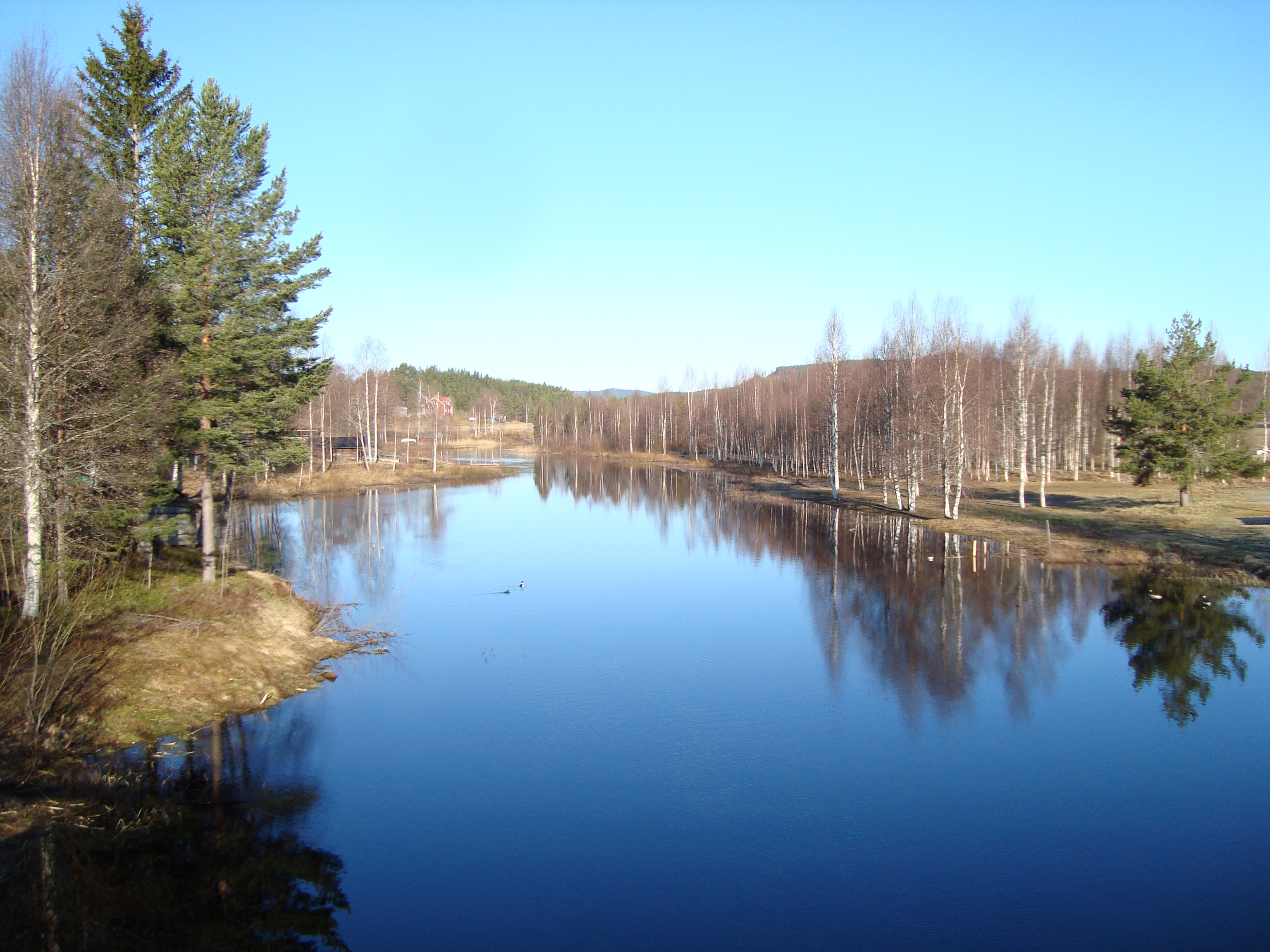 Dysån, Oxberg, Mora kommun, Sverige